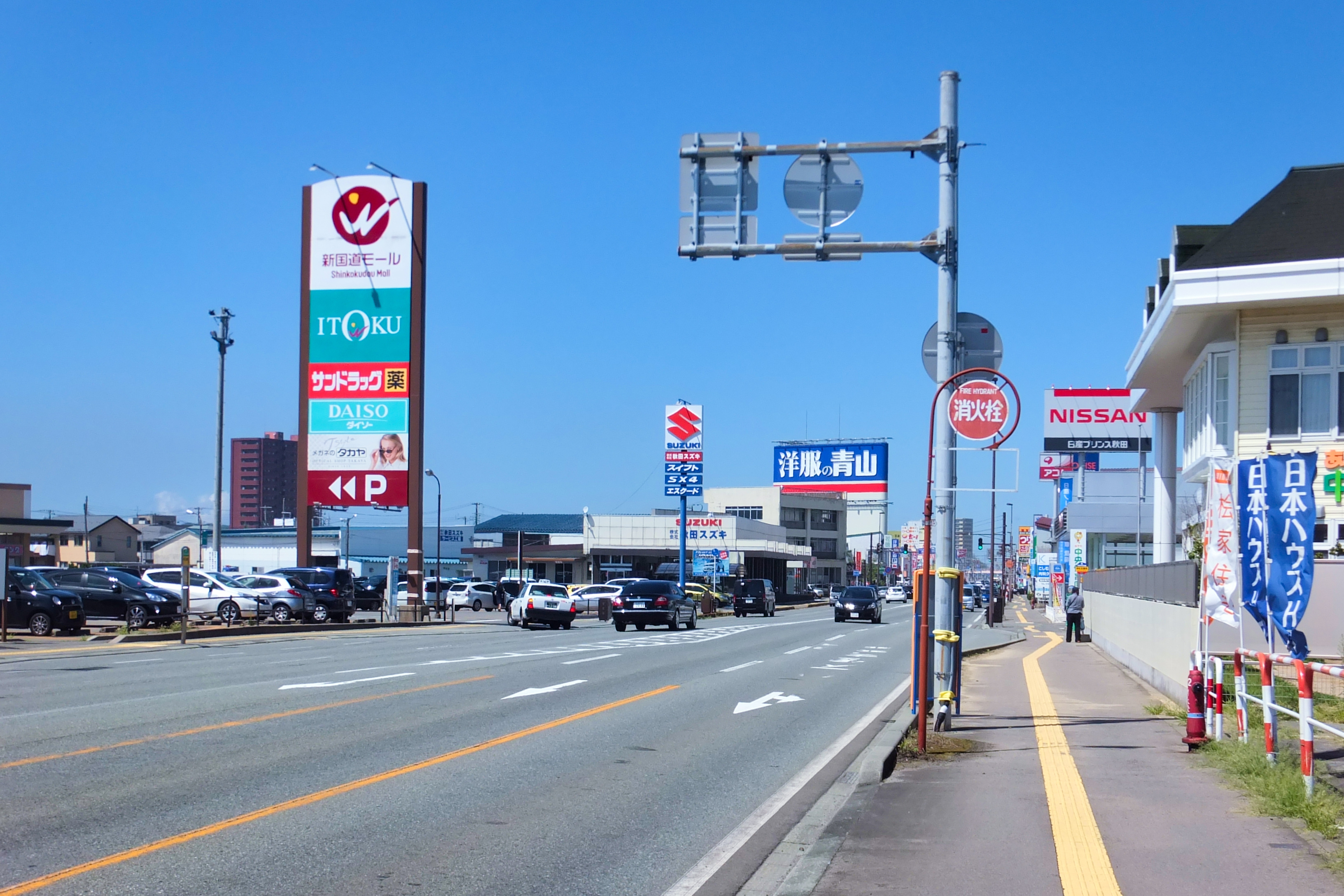 秋田県道56号秋田天王線、秋田市保戸野千代田町付近にて撮影。この道路は国道7号の旧指定区間であり、国道指定を外れた後も「新国道」の通称が残る。